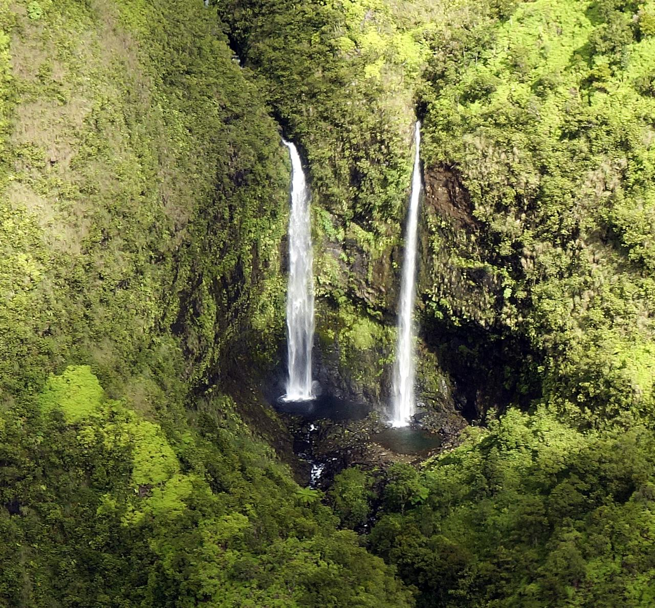 kauai